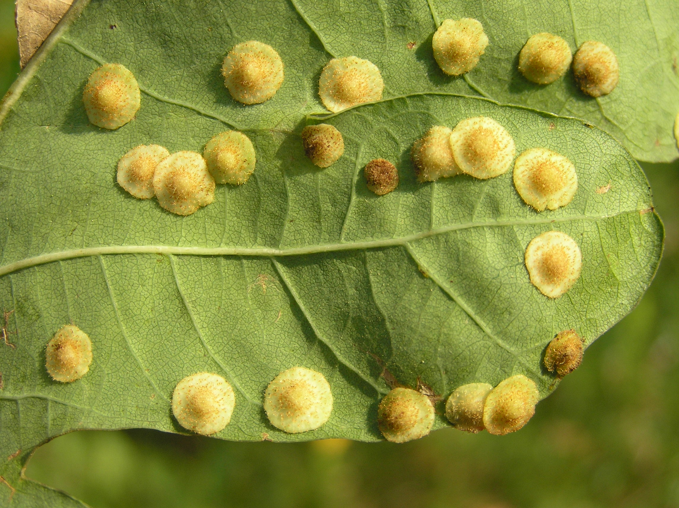 Neuroterus quercus-baccarum; rewiś dębowy, rewiś jagodek; Polska